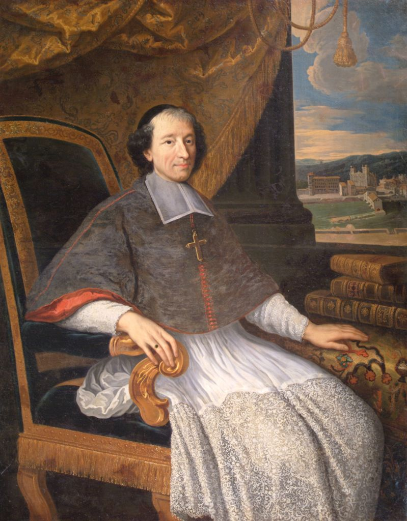 Portail de Mgr Charles le Goux de la Berchère alors archevêque de Narbonne